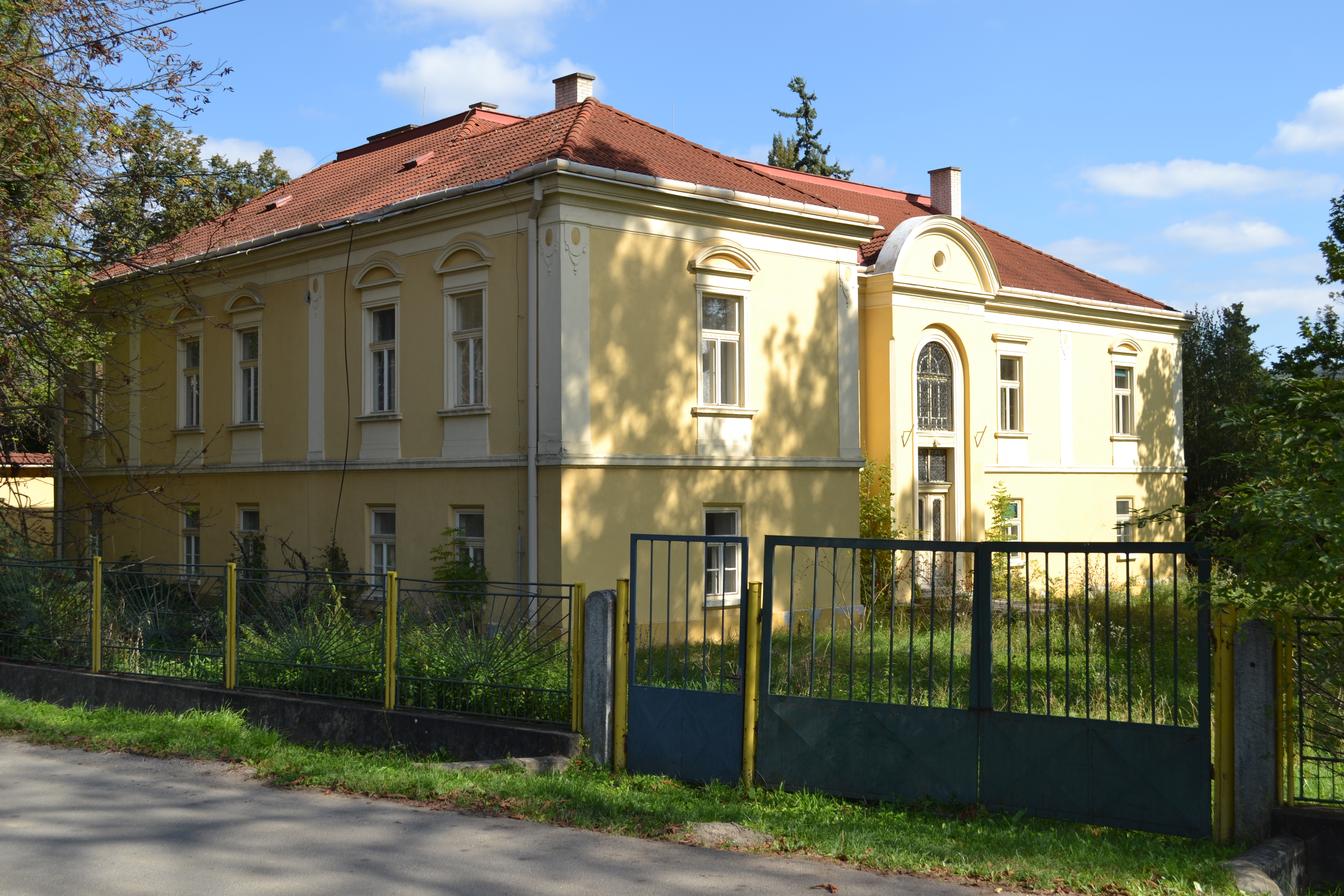 Renesančný kaštieľ z roku 1565 v Hrachove